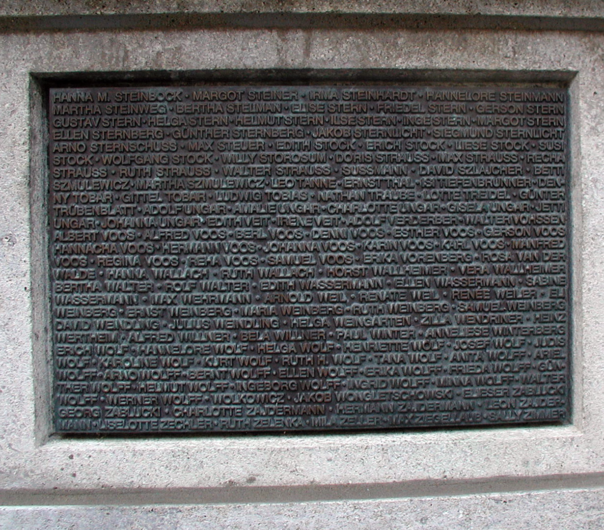 Köln, Erich Klibansky Platz - Löwenbrunnen-Detail